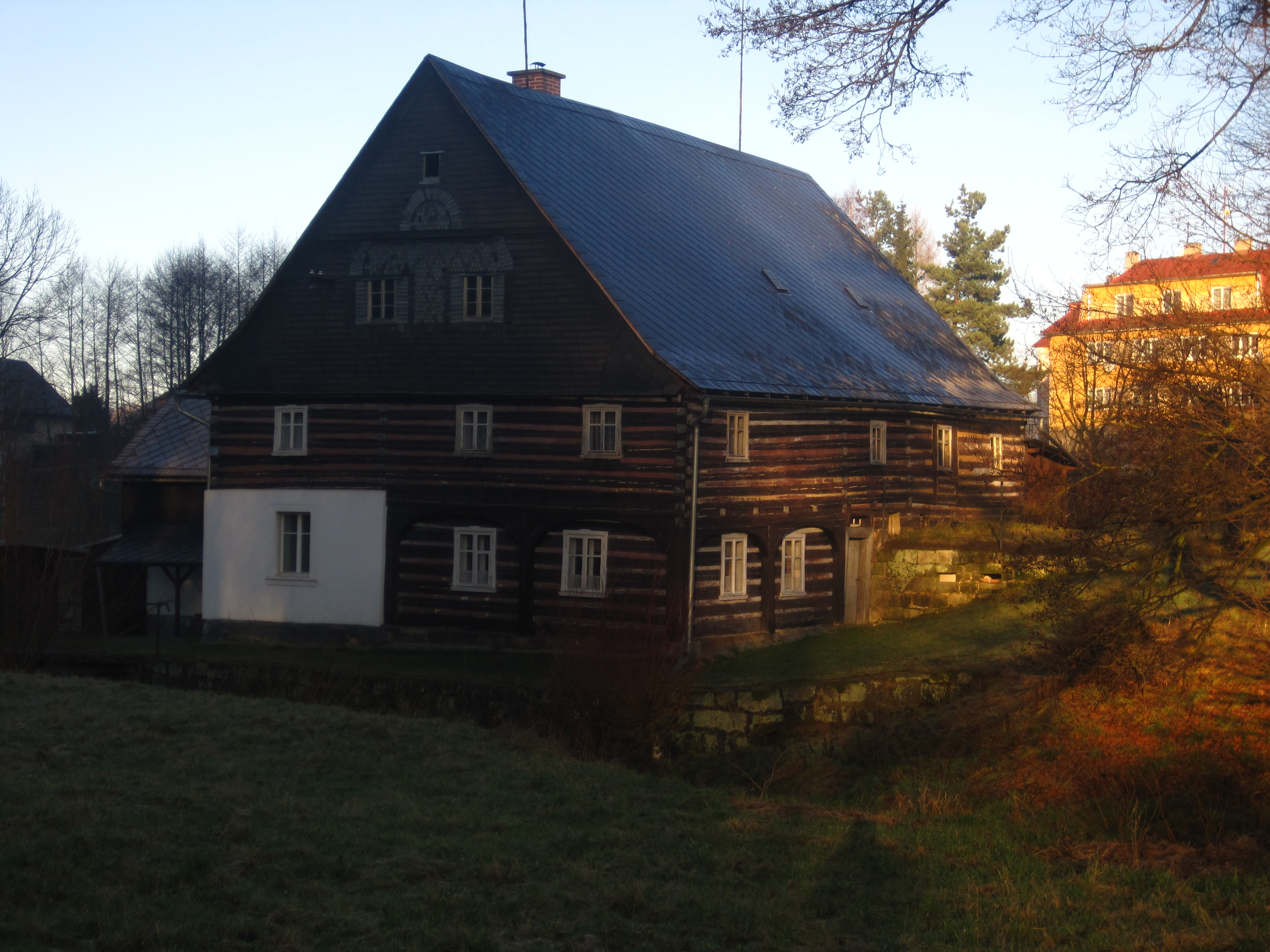 Vodní mlýn, Lázně Kundratice 37, severní strana silnice na Osečnou, Lázně Kundratice.